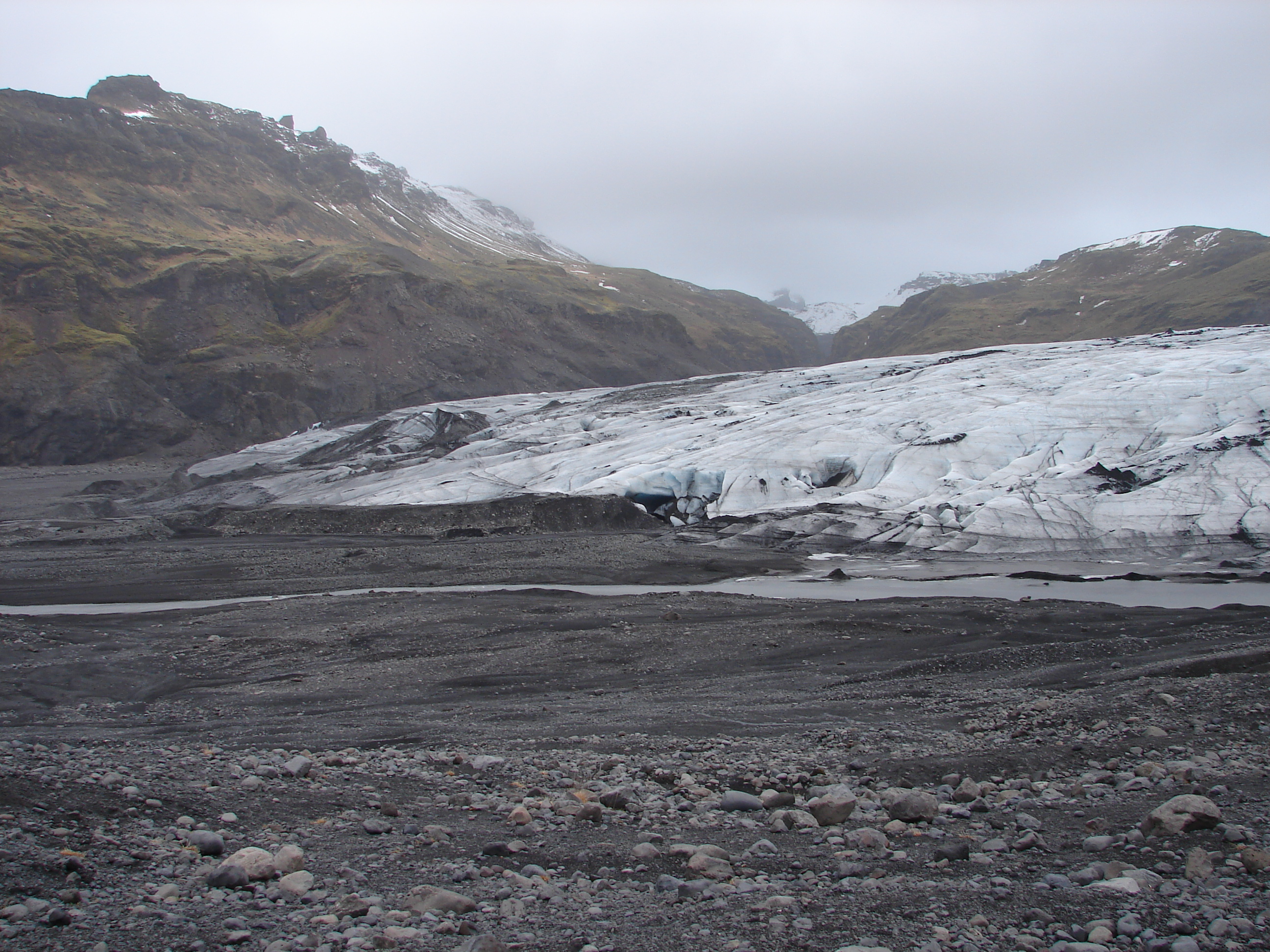 Sólheimajökull Glacier, Iceland